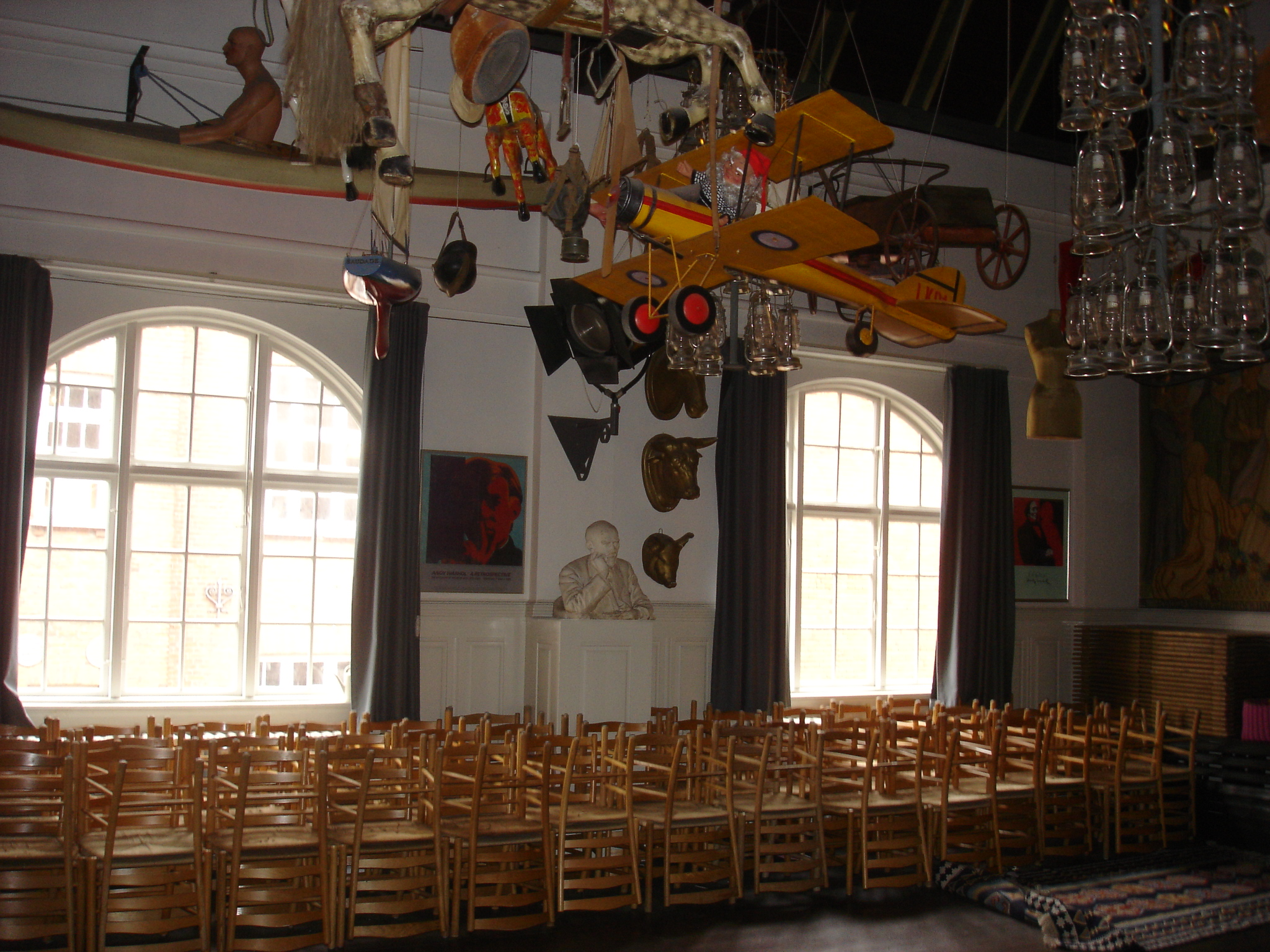 Interiør i Højskoleforeningens sal på Henriette Hørlücks Skole i Odense - midt i billedet ses Elias Ølsgaards portrætbuste af Odense Højskoleforenings mangeårige formand, pastor Emil Koch